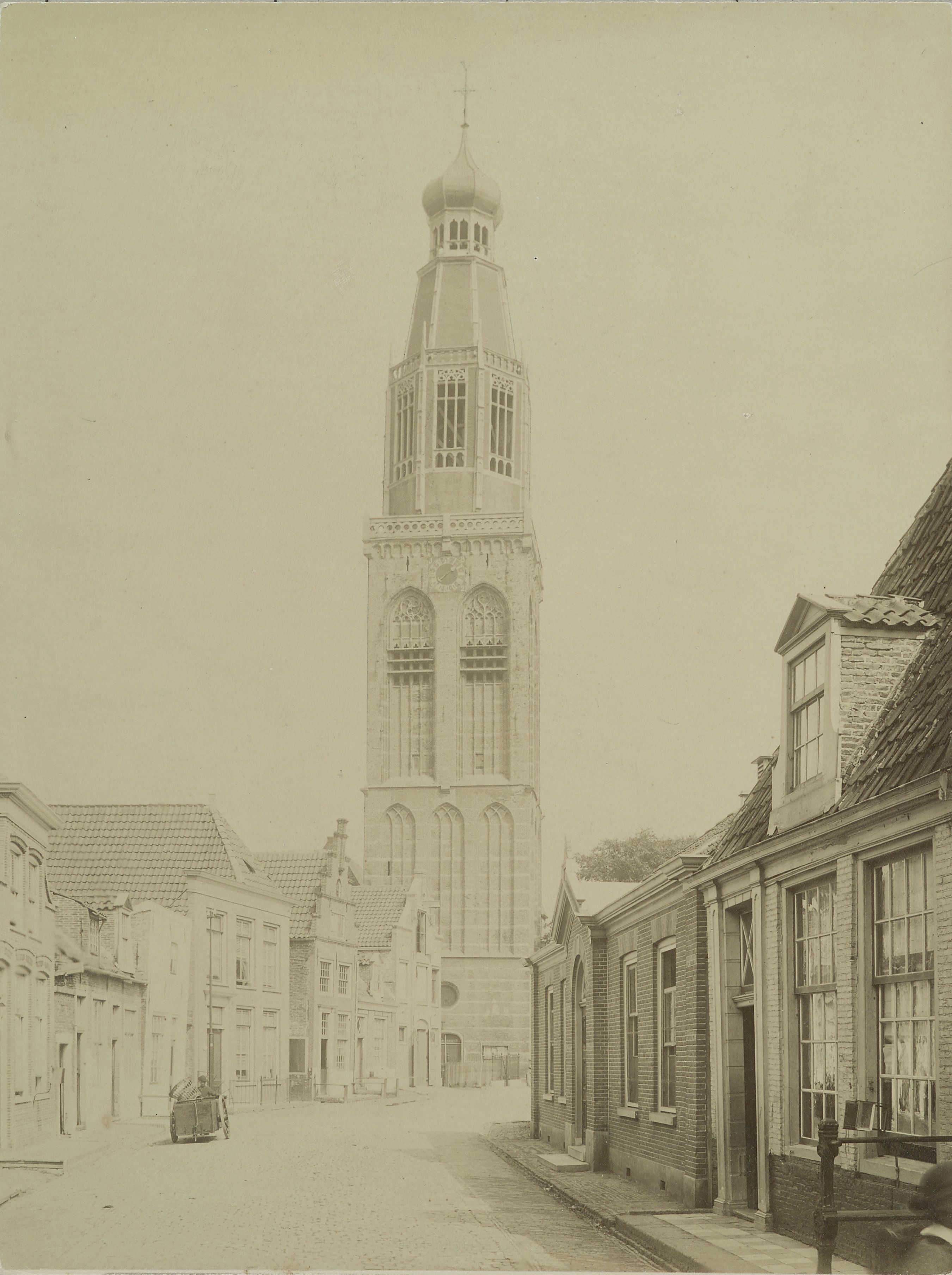 Hervormde Zuiderkerk: Overzicht toren hervormde kerk in straat vanuit het westen (opmerking: Bureau Mulder)